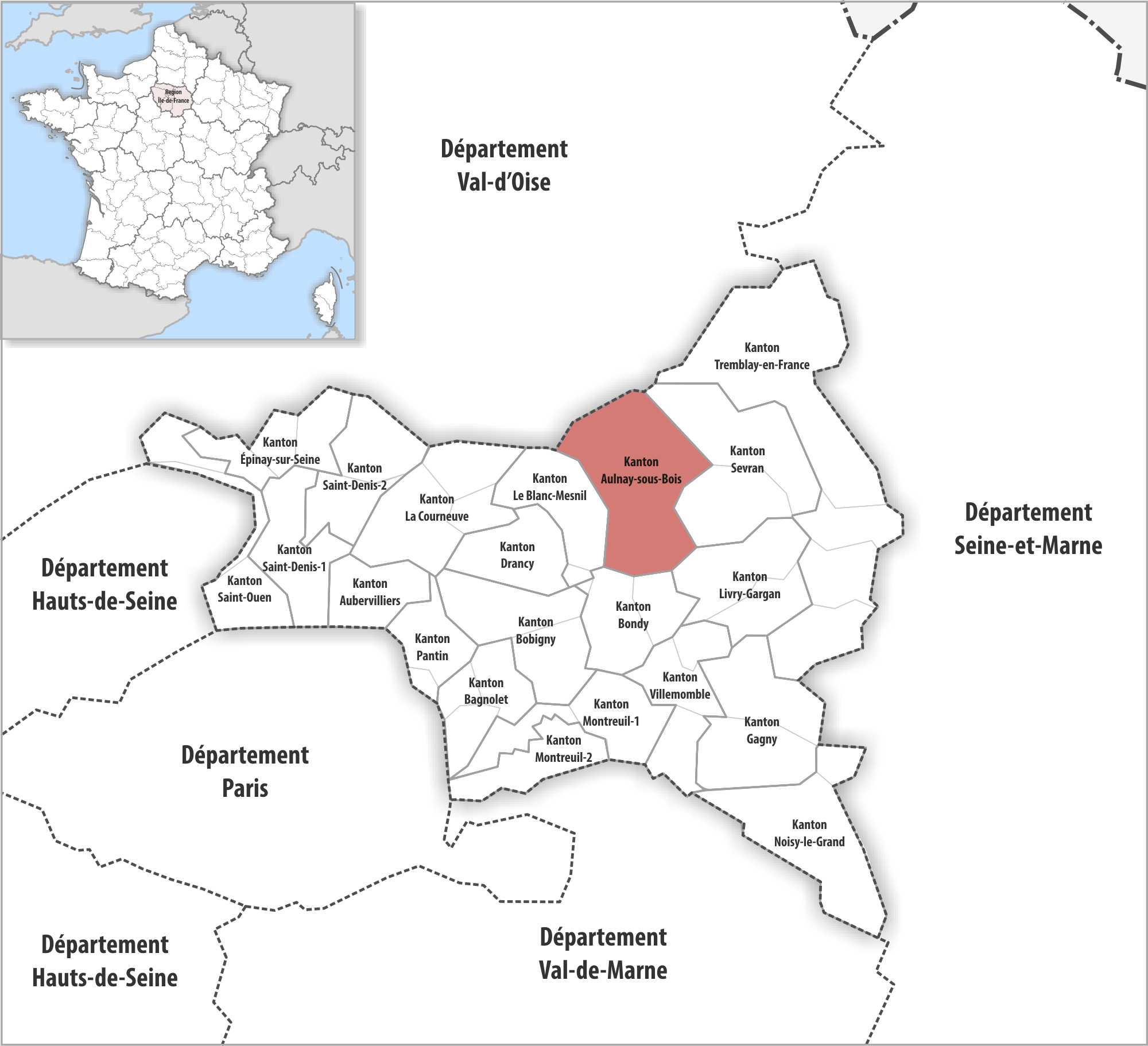 Lage des Kantons Aulnay-sous-Bois